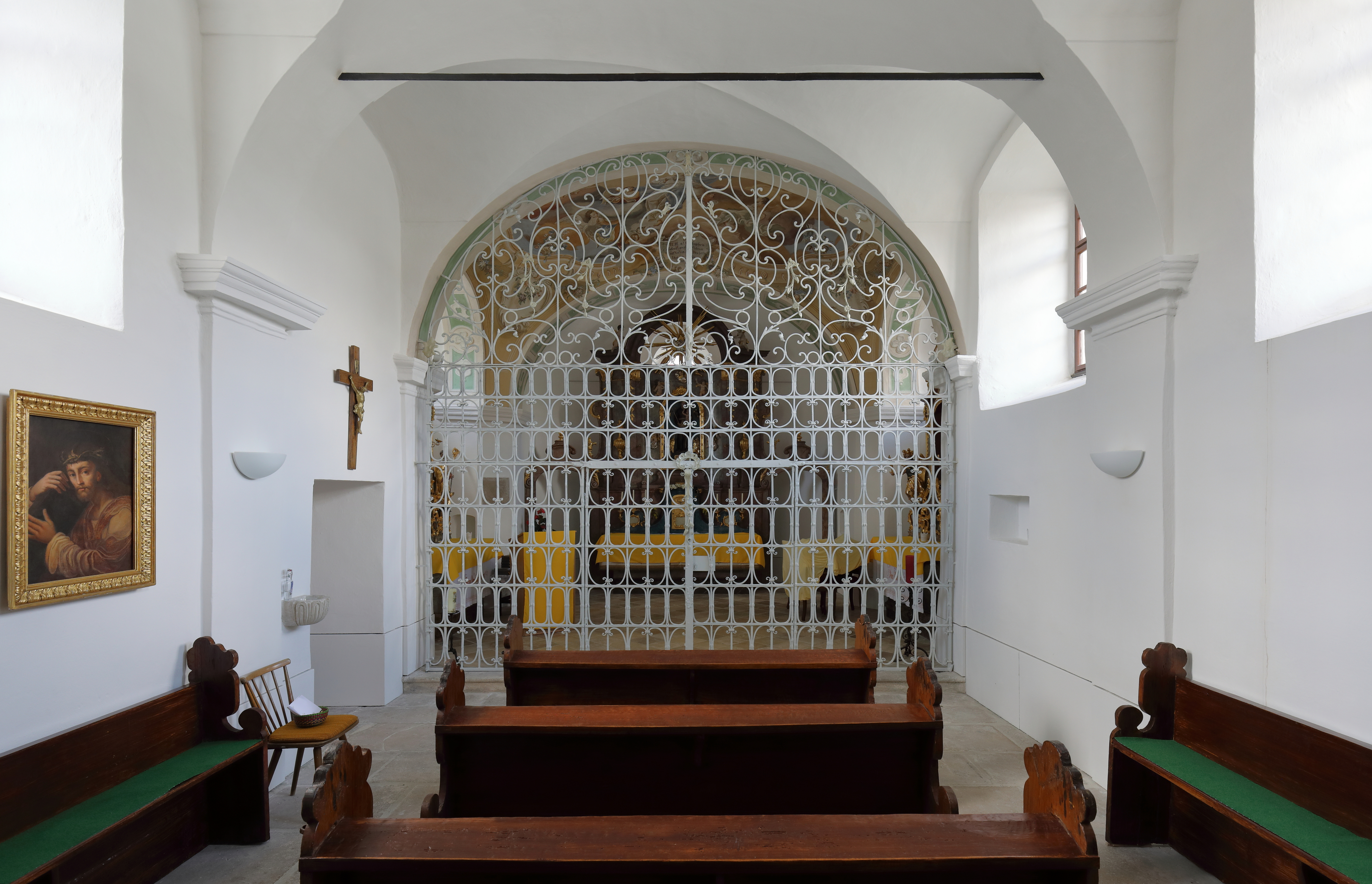 Innenansicht der Antonikapelle in der burgenländischen Marktgemeinde Großhöflein. Der kleine Barockbau mit Querschiff, einer flach geschlossenen Apsis mit abgeschrägten Ecken und einem Dachreiter mit Spitzhelm wurde von der Fürstin Maria Octavia Esterházy 1730 gestiftet und 1767 geweiht.